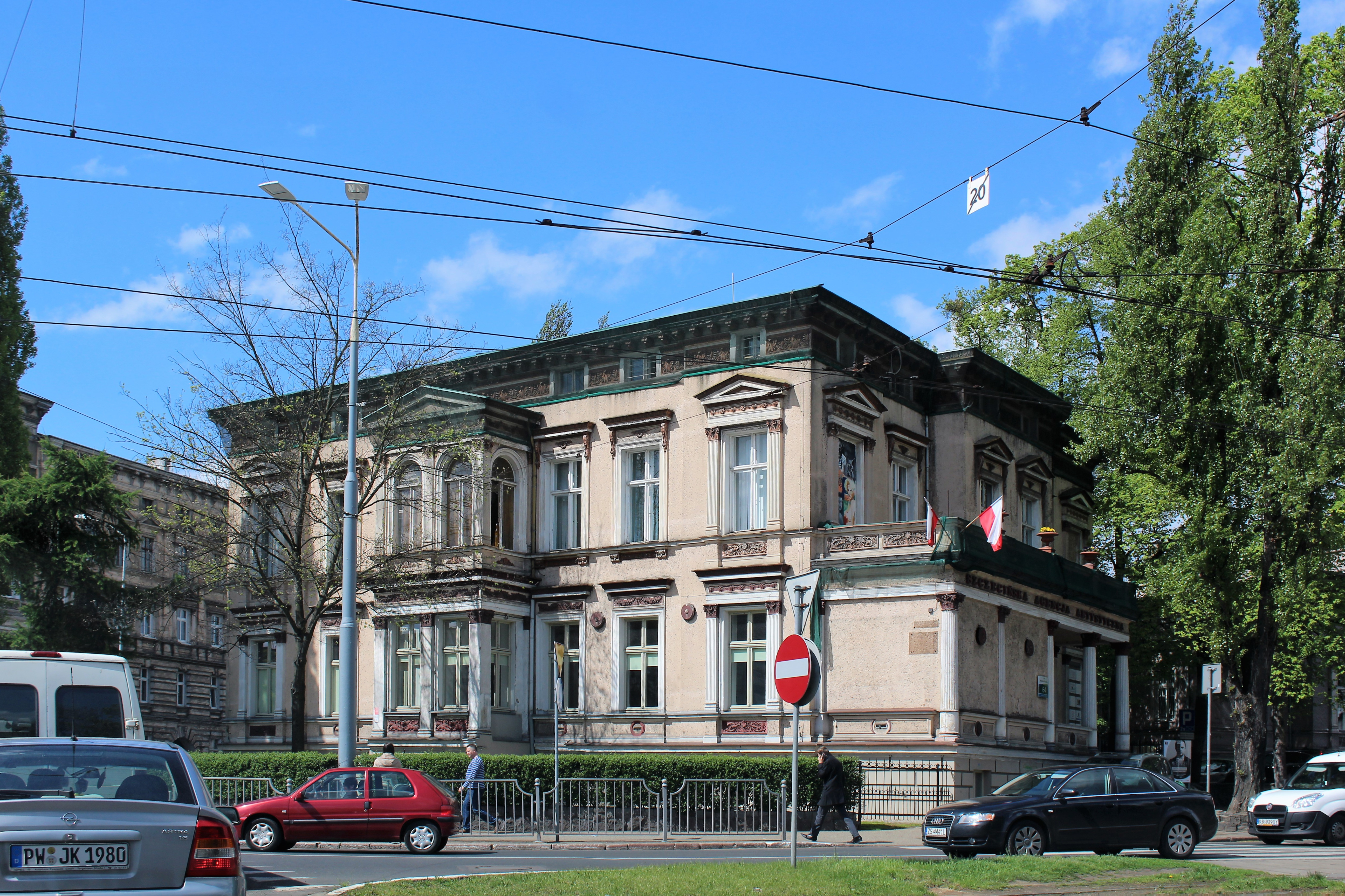 Szczecin, al. Wojska Polskiego 64 - willa, ob. Szczecińska Agencja Artystyczna, po 1870